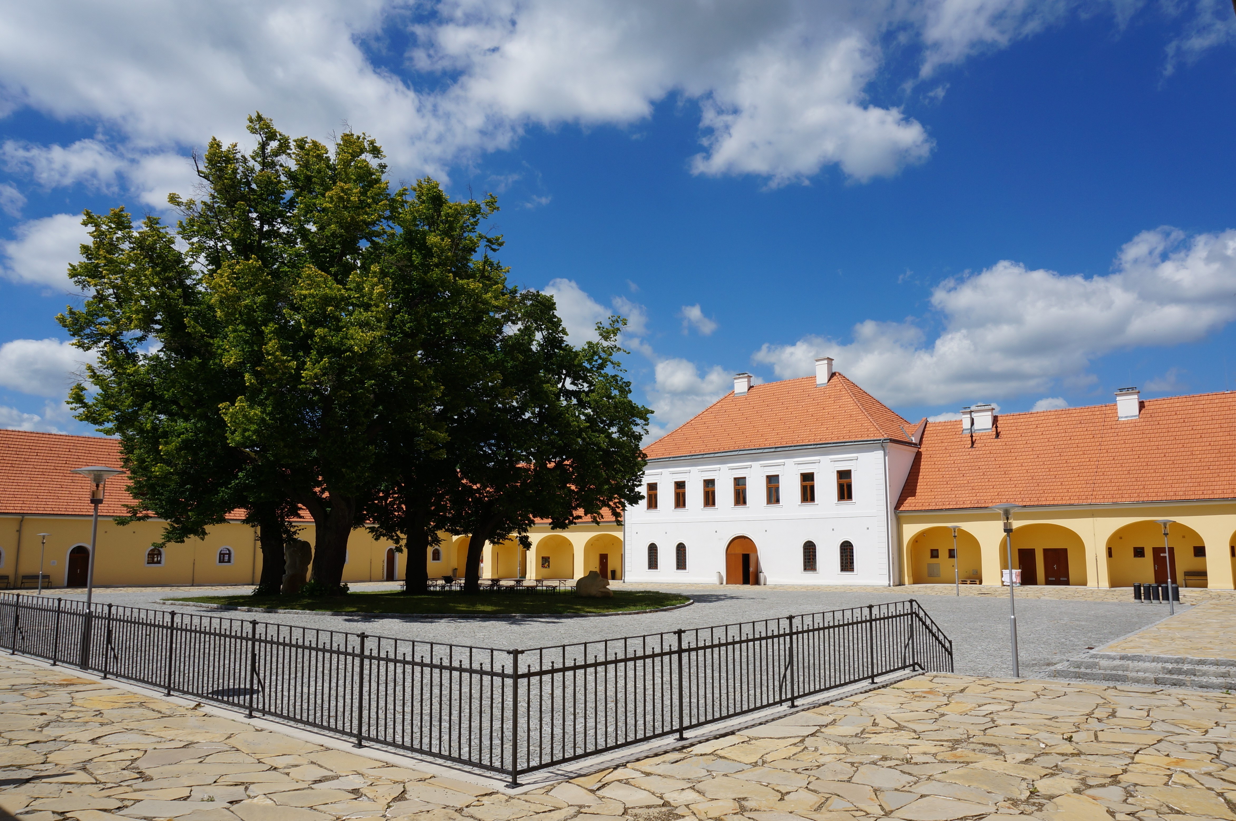 Opravená stavba původního dvora